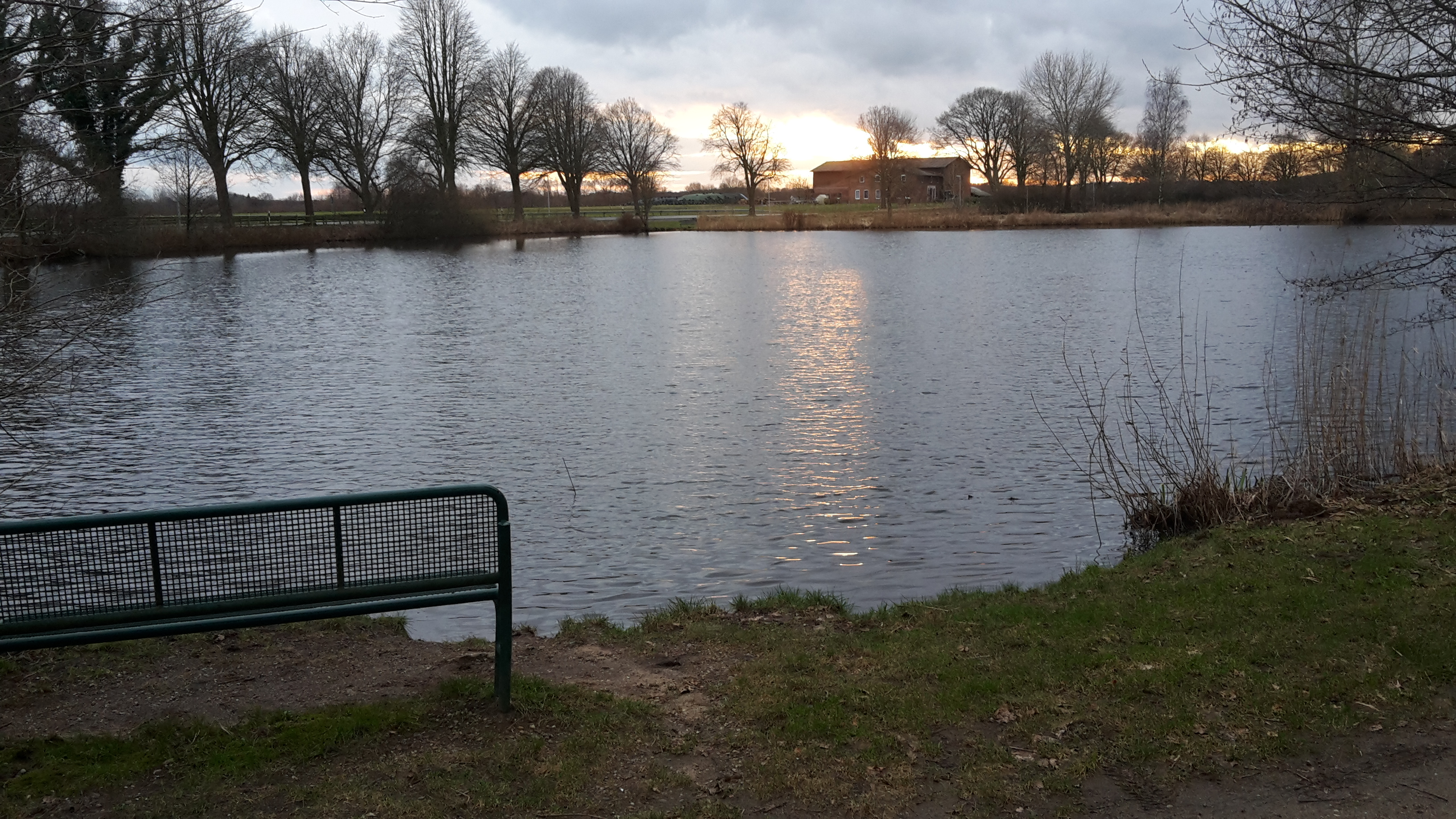 Der Mühlenteich in Schenefeld (Kreis Steinburg)